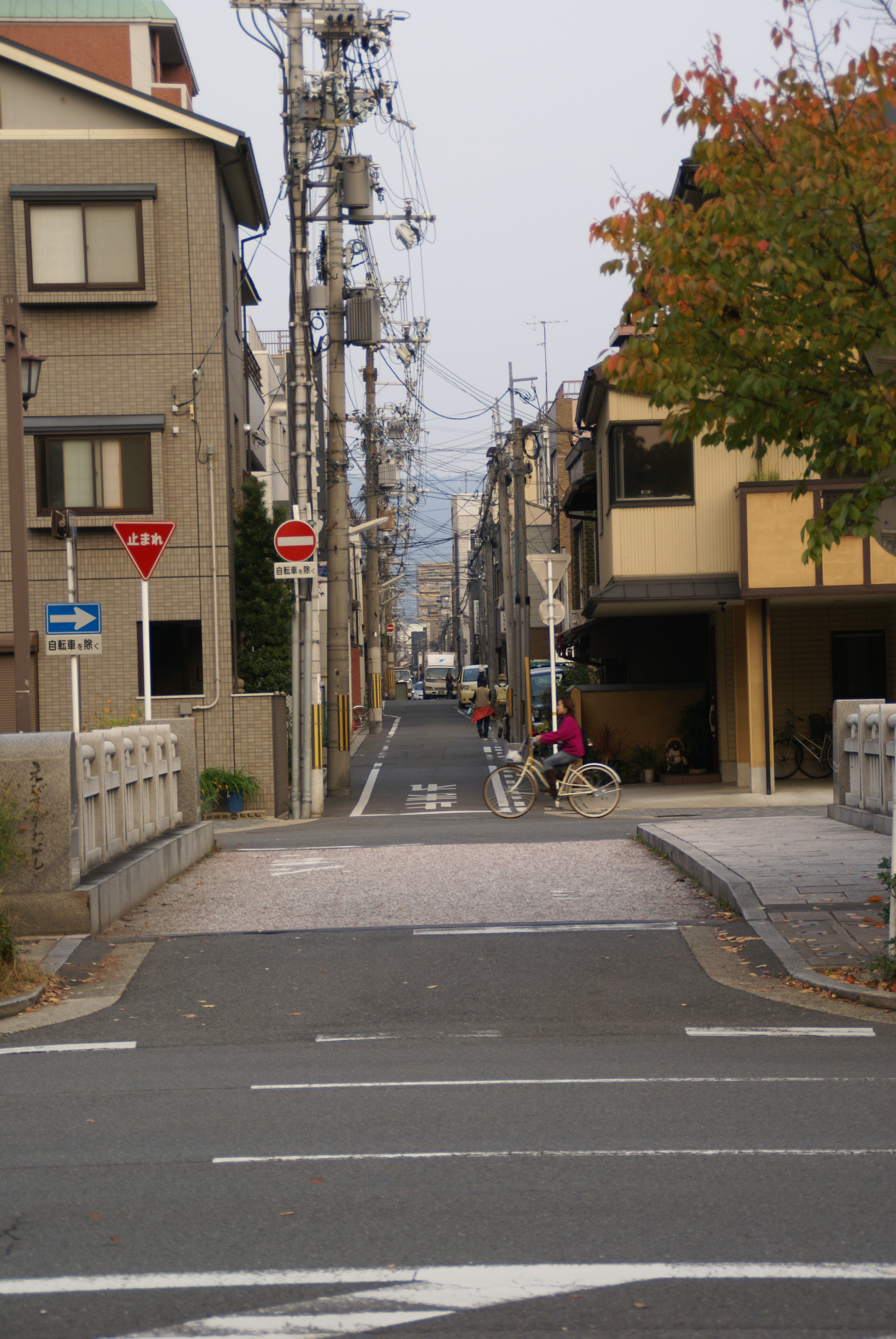 夷川通, Ebisugawa Dori, Ebisugawa Street